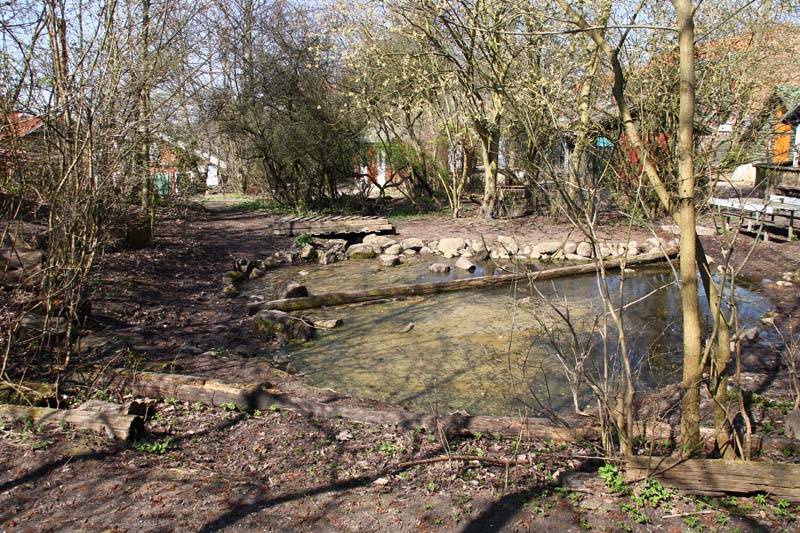 Kilden i Næstved